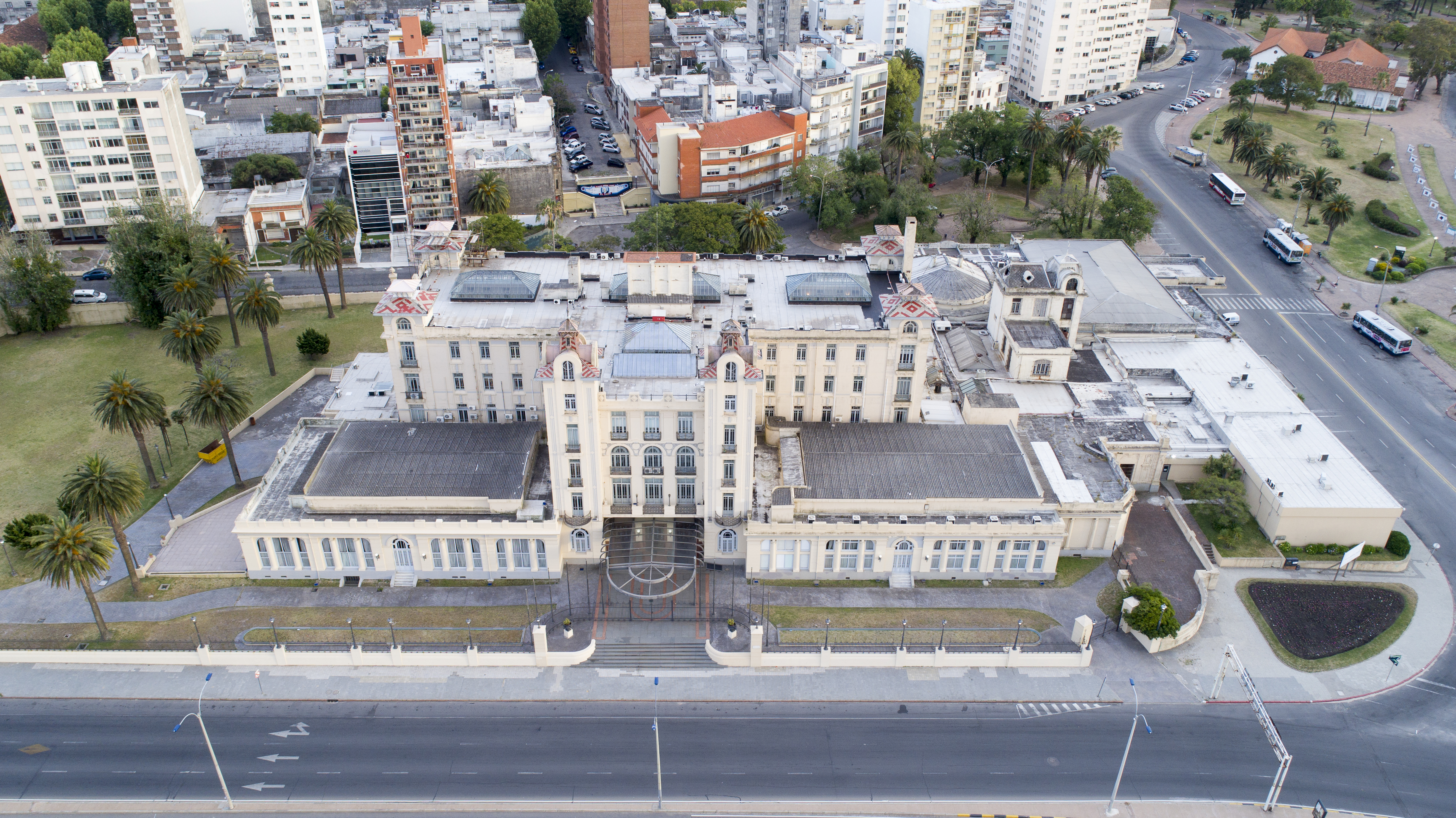 Sede del MERCOSUR, Montevideo, Uruguay, vista aérea.